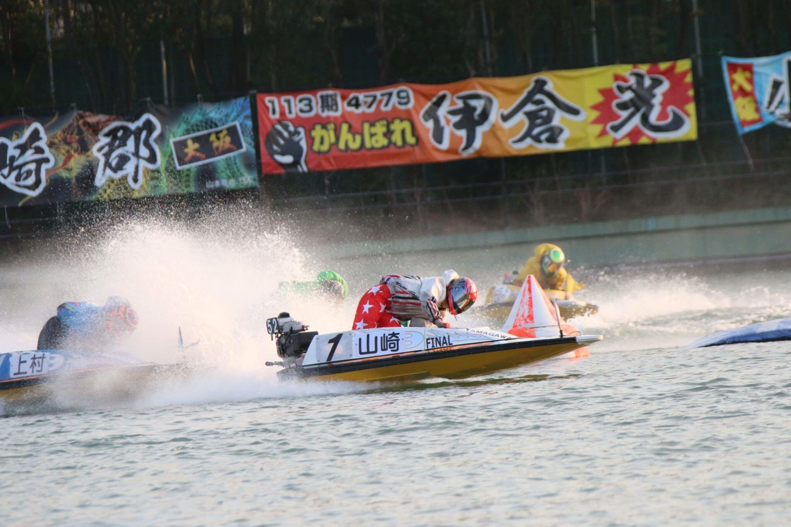 初優勝時写真1（ボートレース多摩川にて）